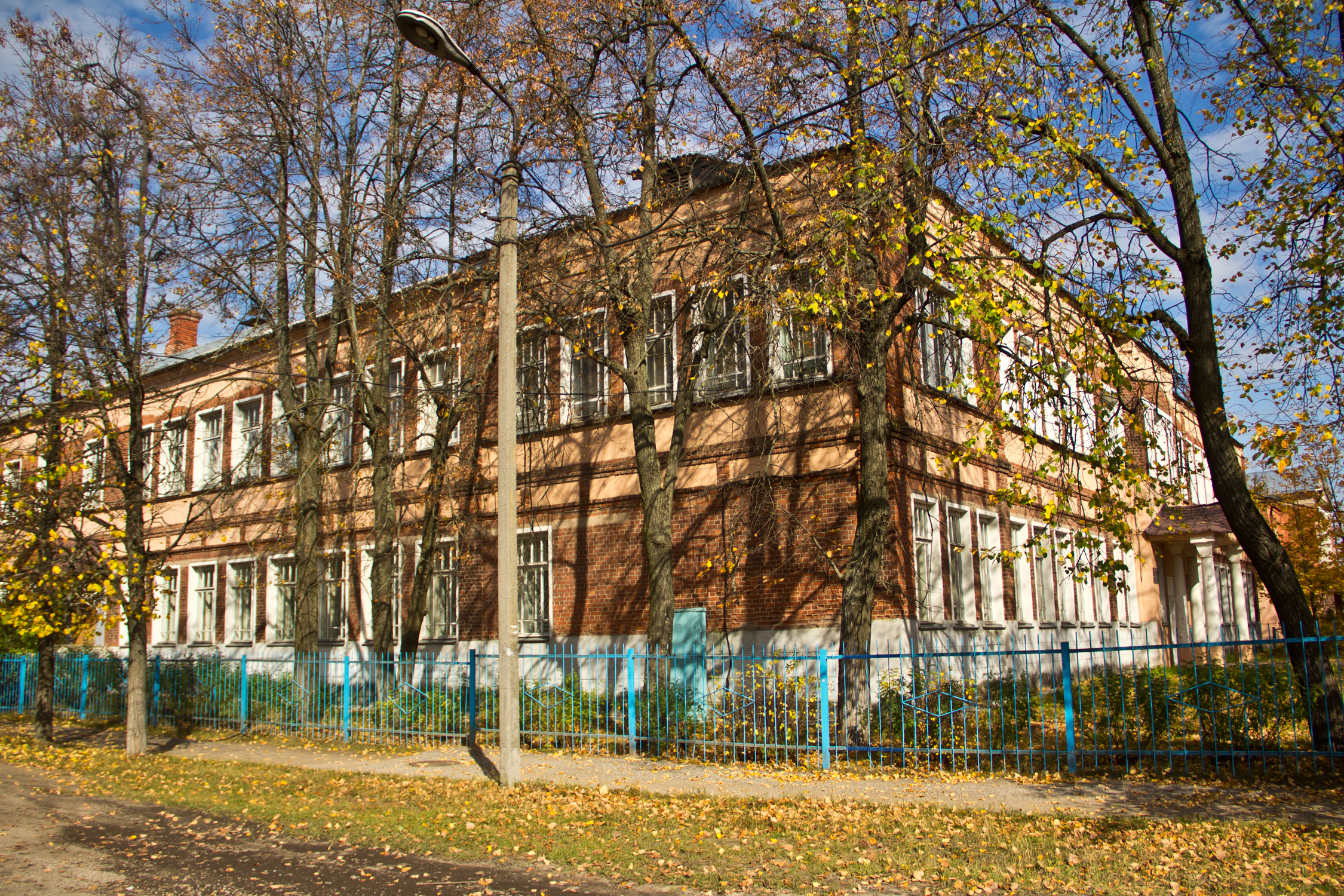 школа нач.XX в.